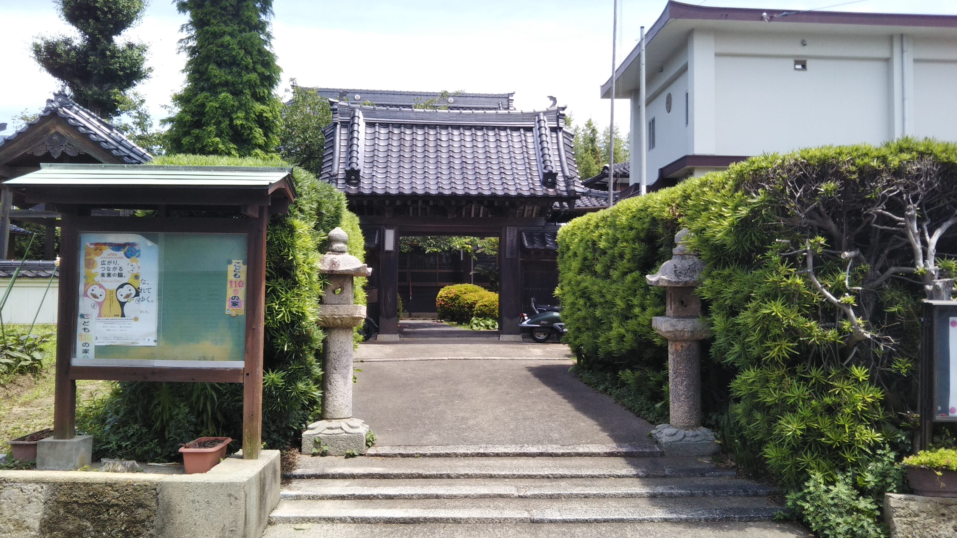 山口県下関市大字綾羅木了元寺